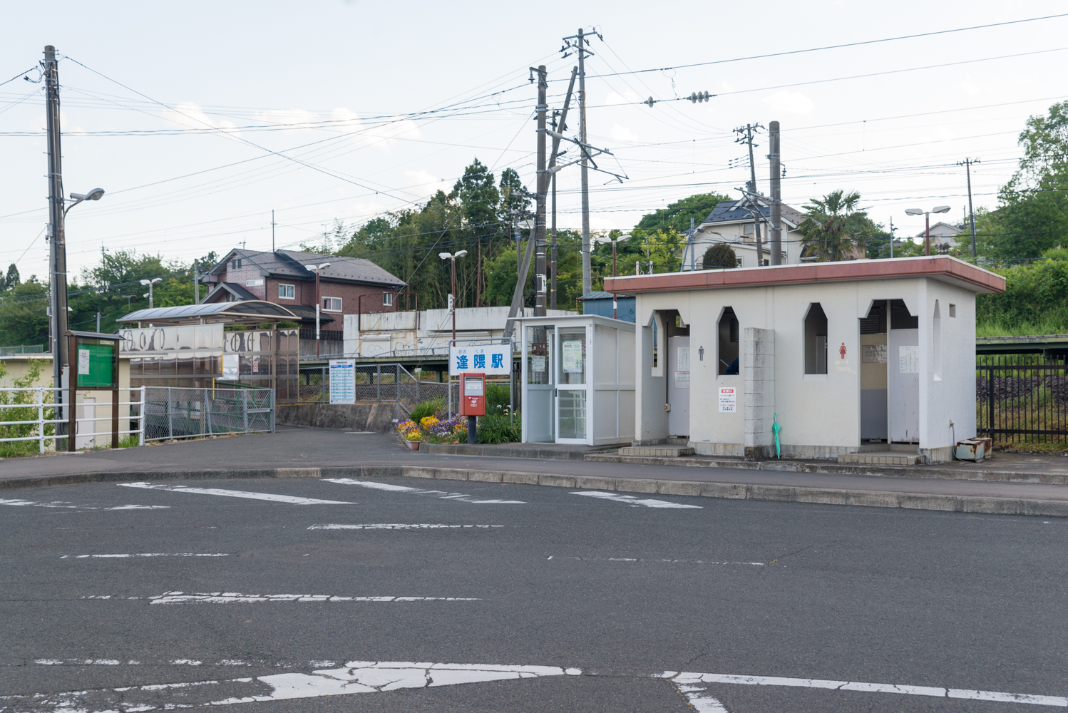 東日本旅客鉄道株式会社常磐線逢隈駅駅入口